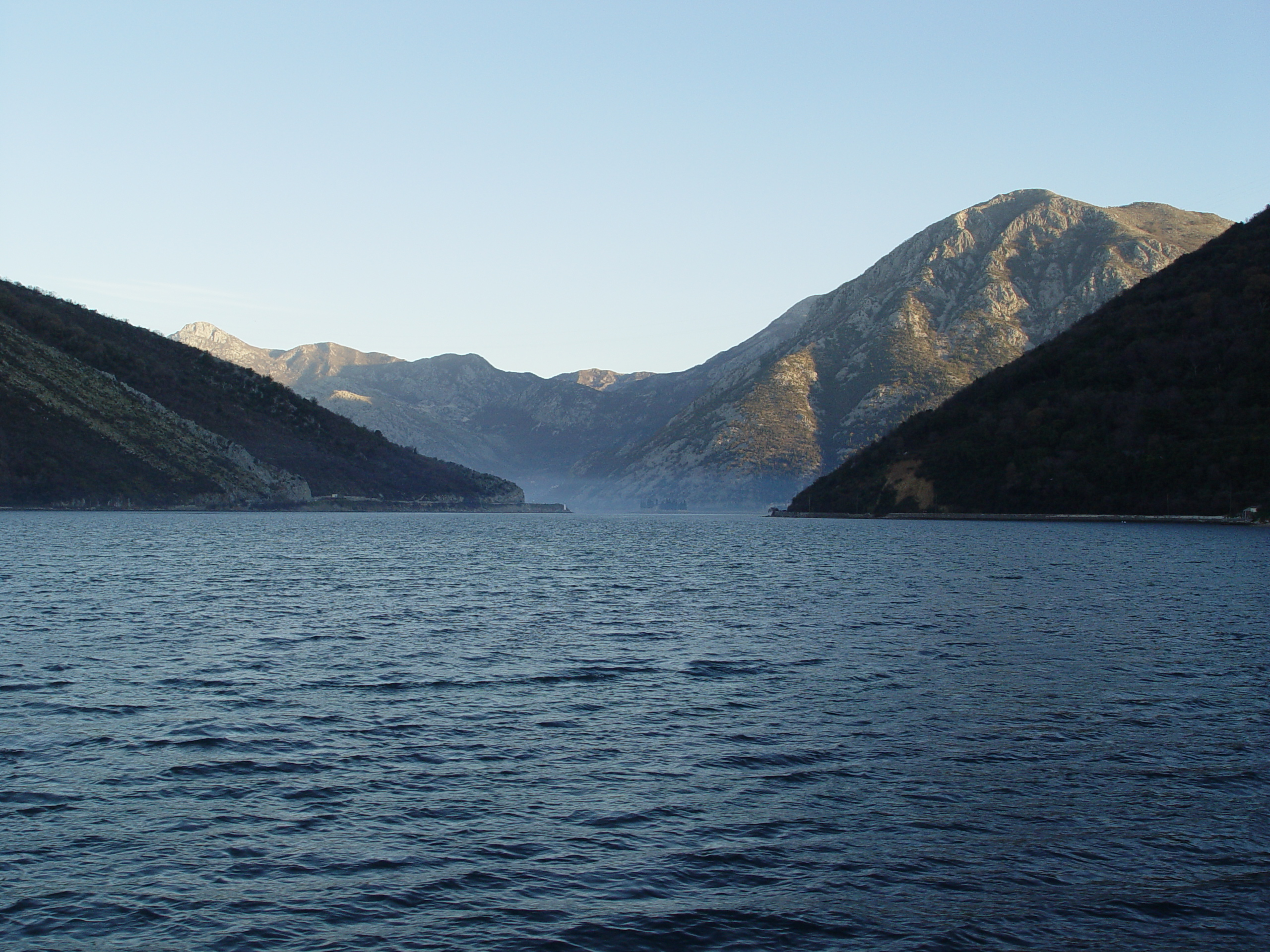 Boka Kotorska.